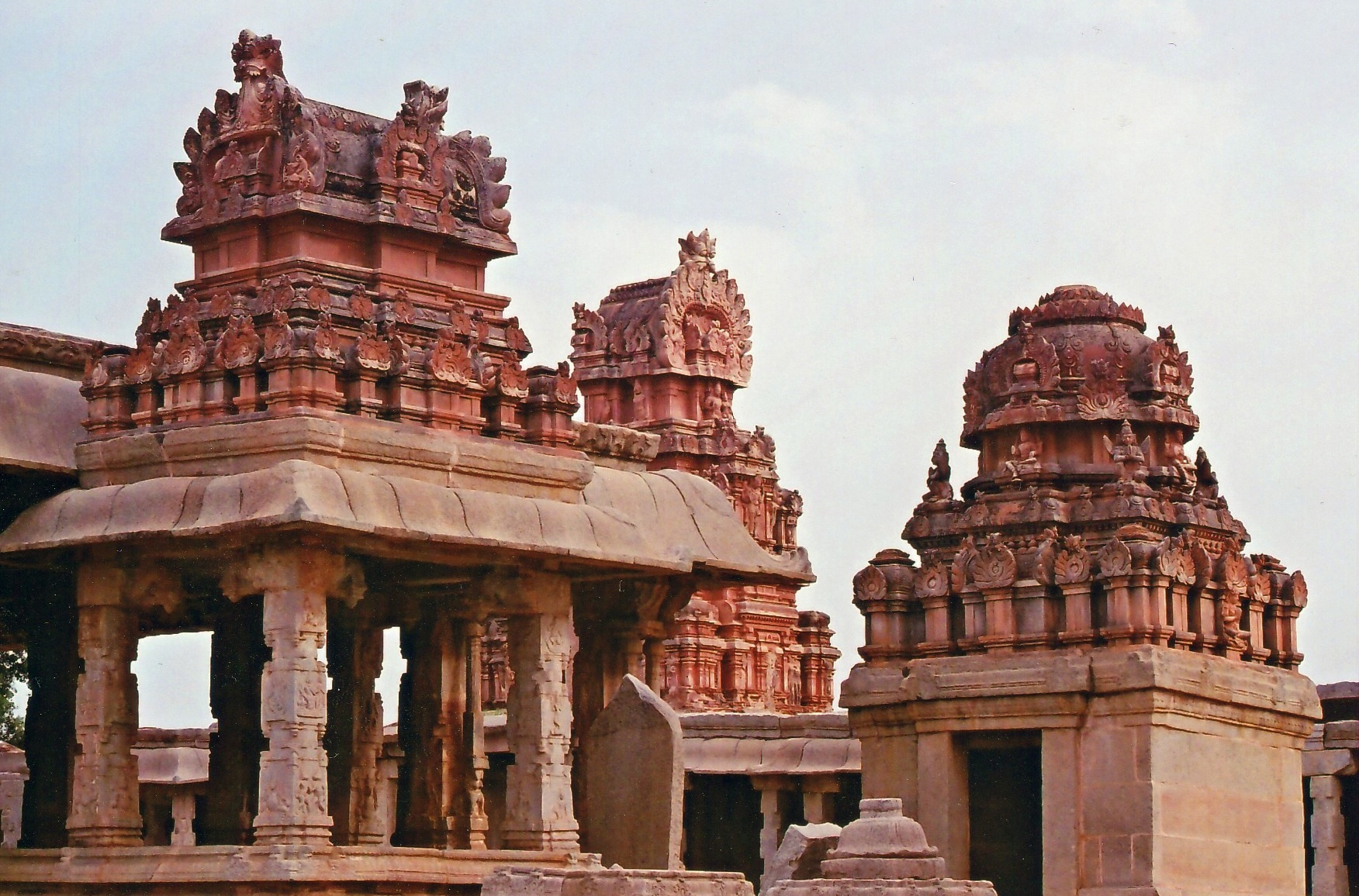 Photograph taken by Dineshkannambadi at Balakrishna temple in Hampi, Karnataka state, India in June 2004.